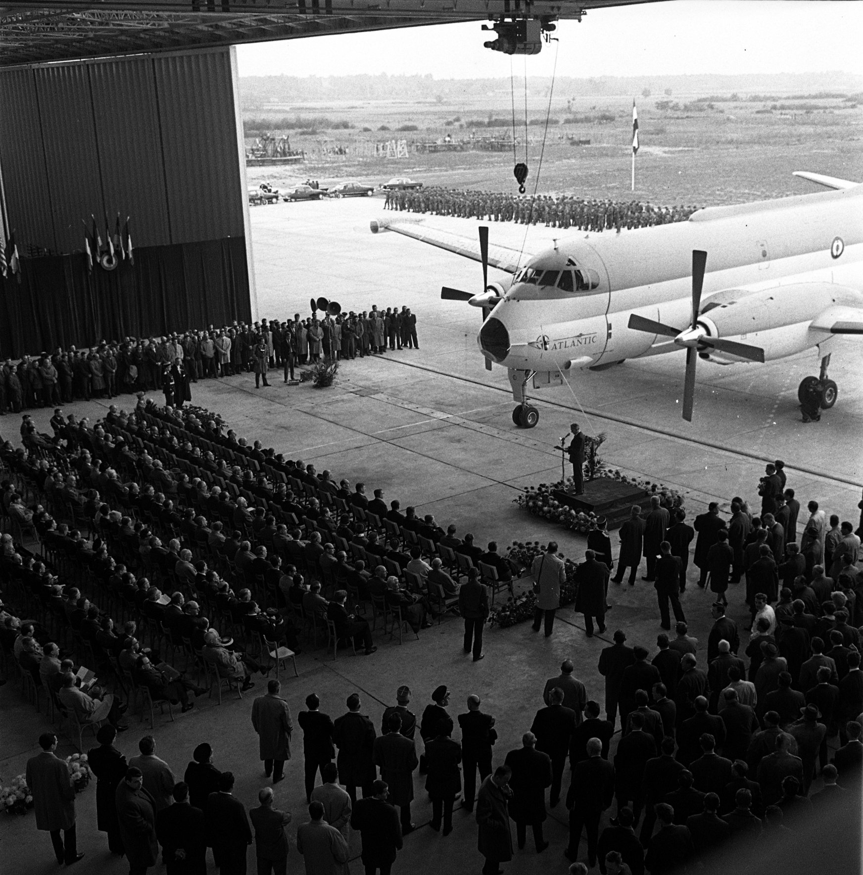 Ateliers Bréguet (Colomiers). 3 novembre 1961. Vue d'ensemble en plongée de la cérémonie de baptême de l'avion militaire "Bréguet 1150 Atlantic" destiné aux forces de l'OTAN en présence de M. Pierre Mesmer (ministre de la Guerre) et de son épouse (marraine de l'avion) : au centre discours du ministre ; avion stationné à l'entrée du hangar ; foule.